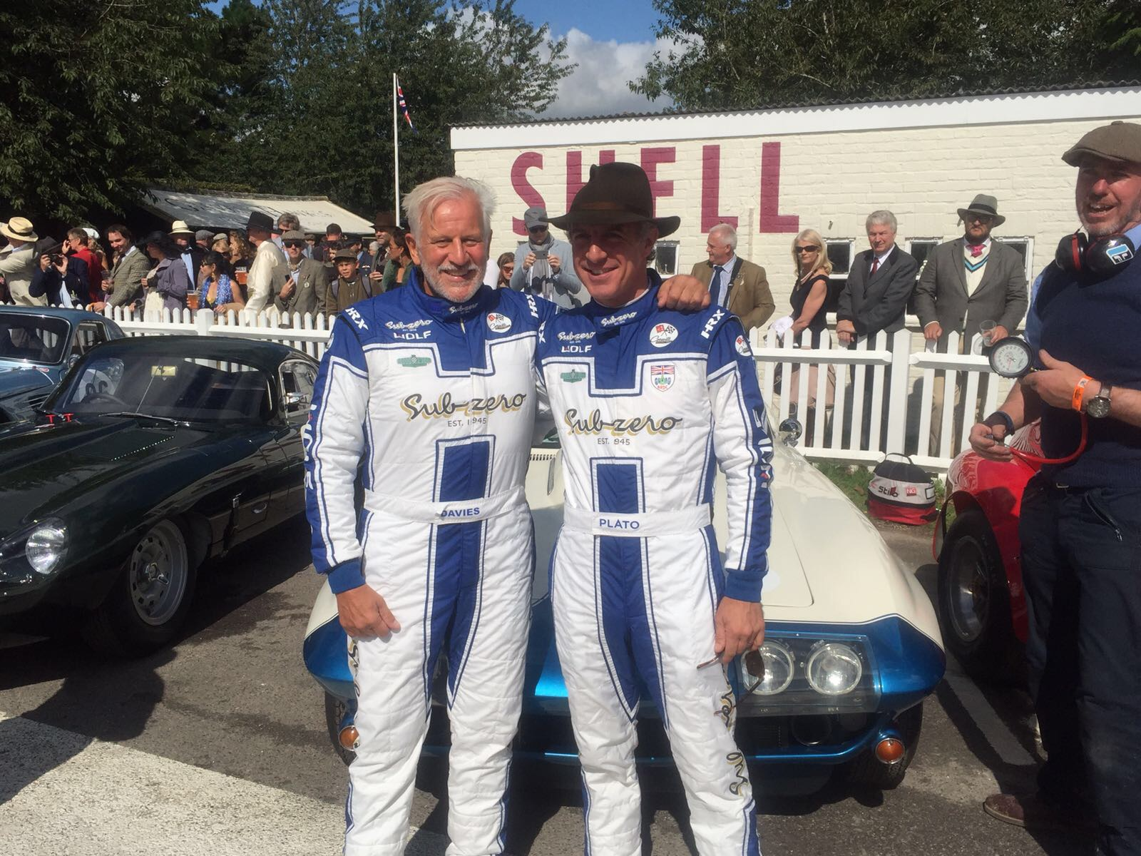 Goodwood Revival 2018 Corvette Stingray